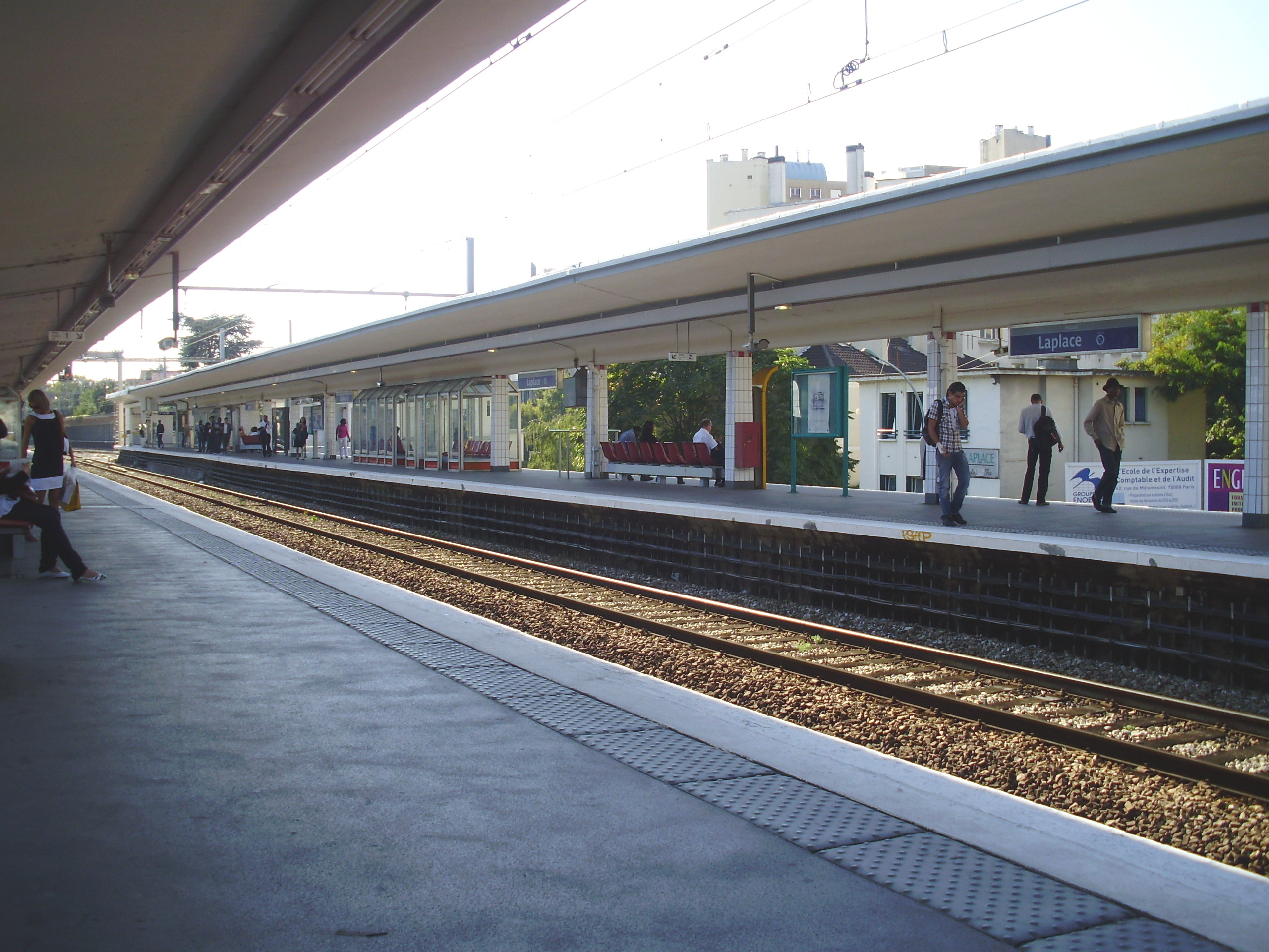 Gare de Laplace, à Arcueil, Val-de-Marne, France (vue en direction de Robinson/Saint-Rémy-lès-Chevreuse depuis le milieu du quai pour ces destinations)